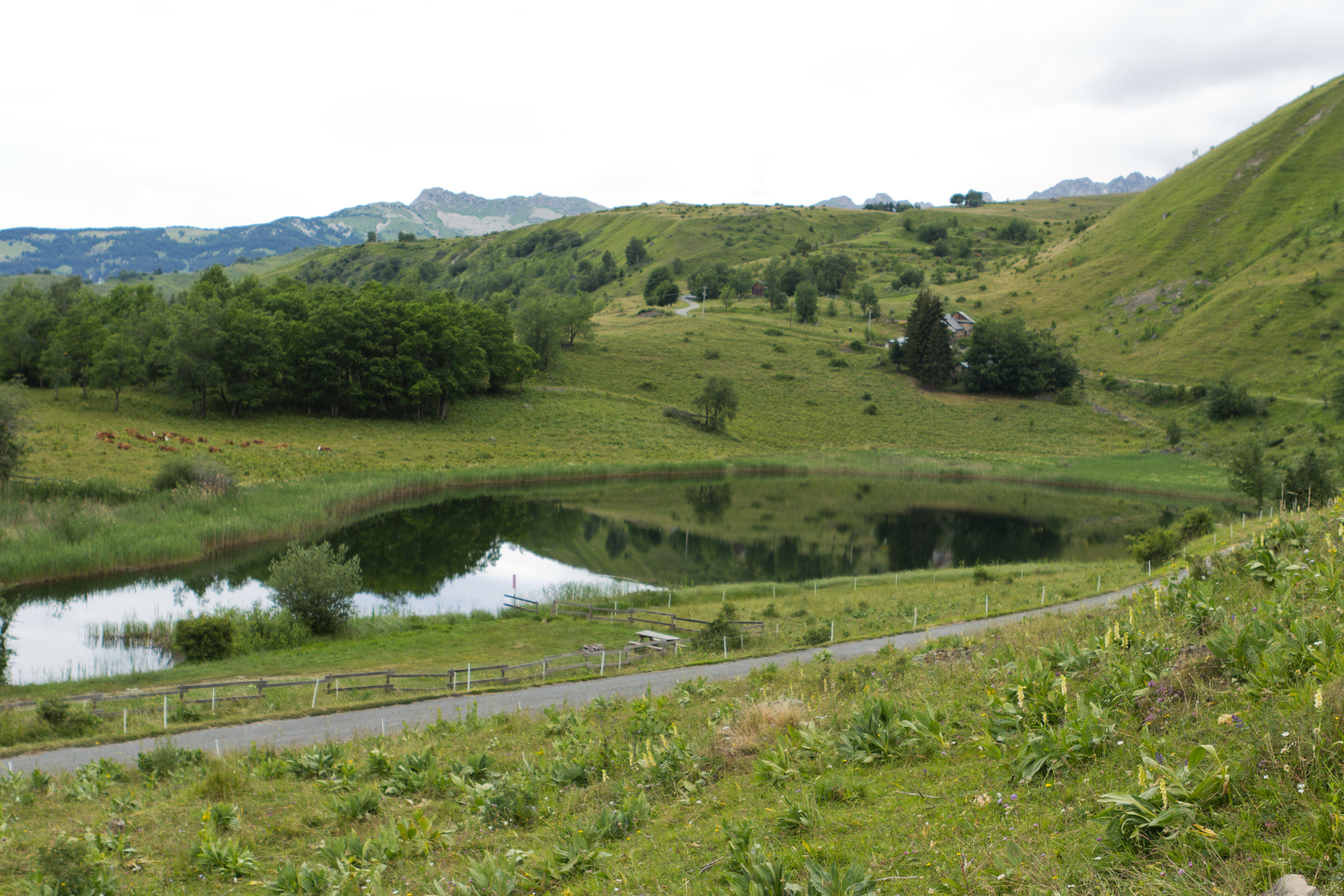 Lac du Loup, commune de Montaimont, département de Savoie. France